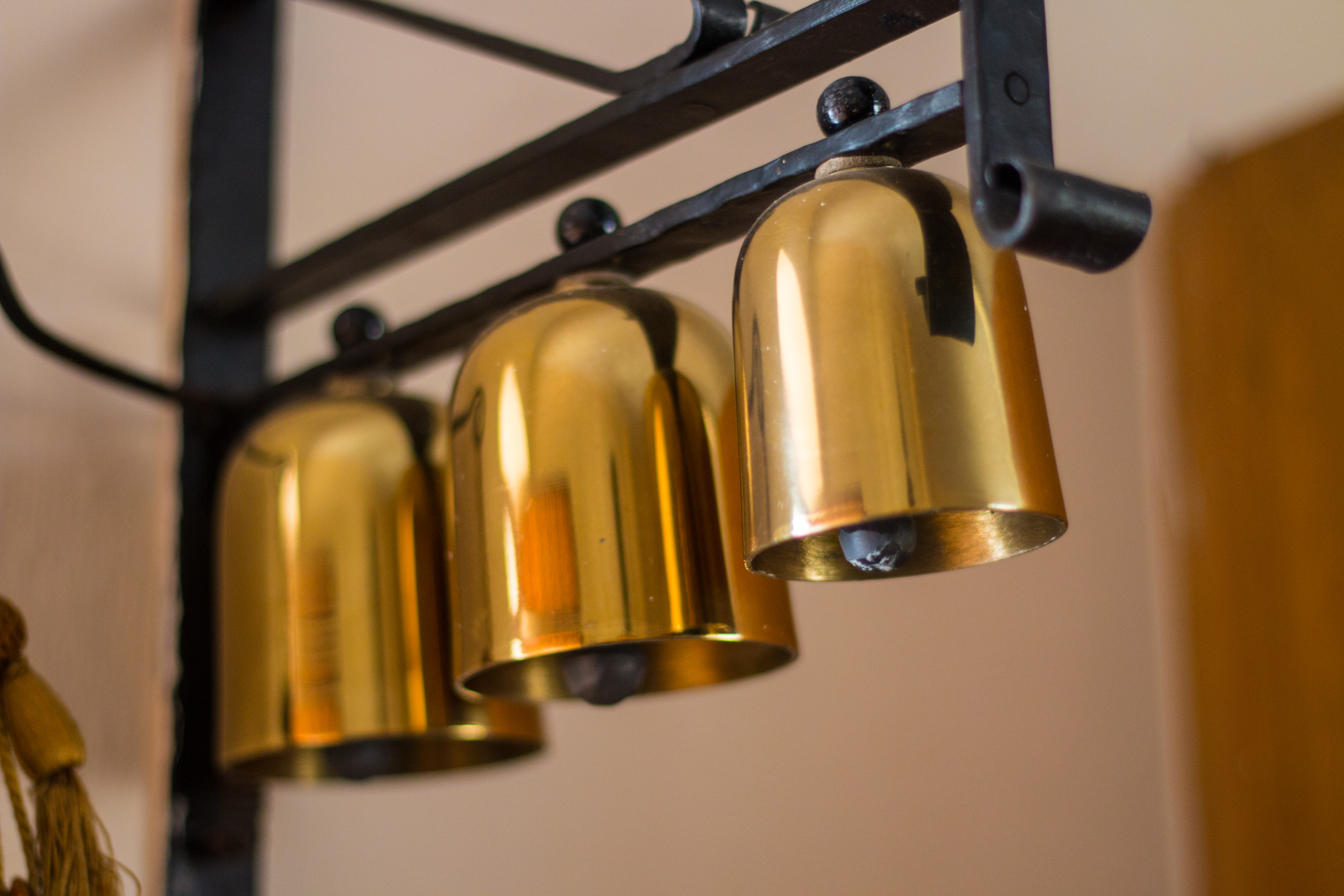 Bad Harzburg, katholische Liebfrauenkirche